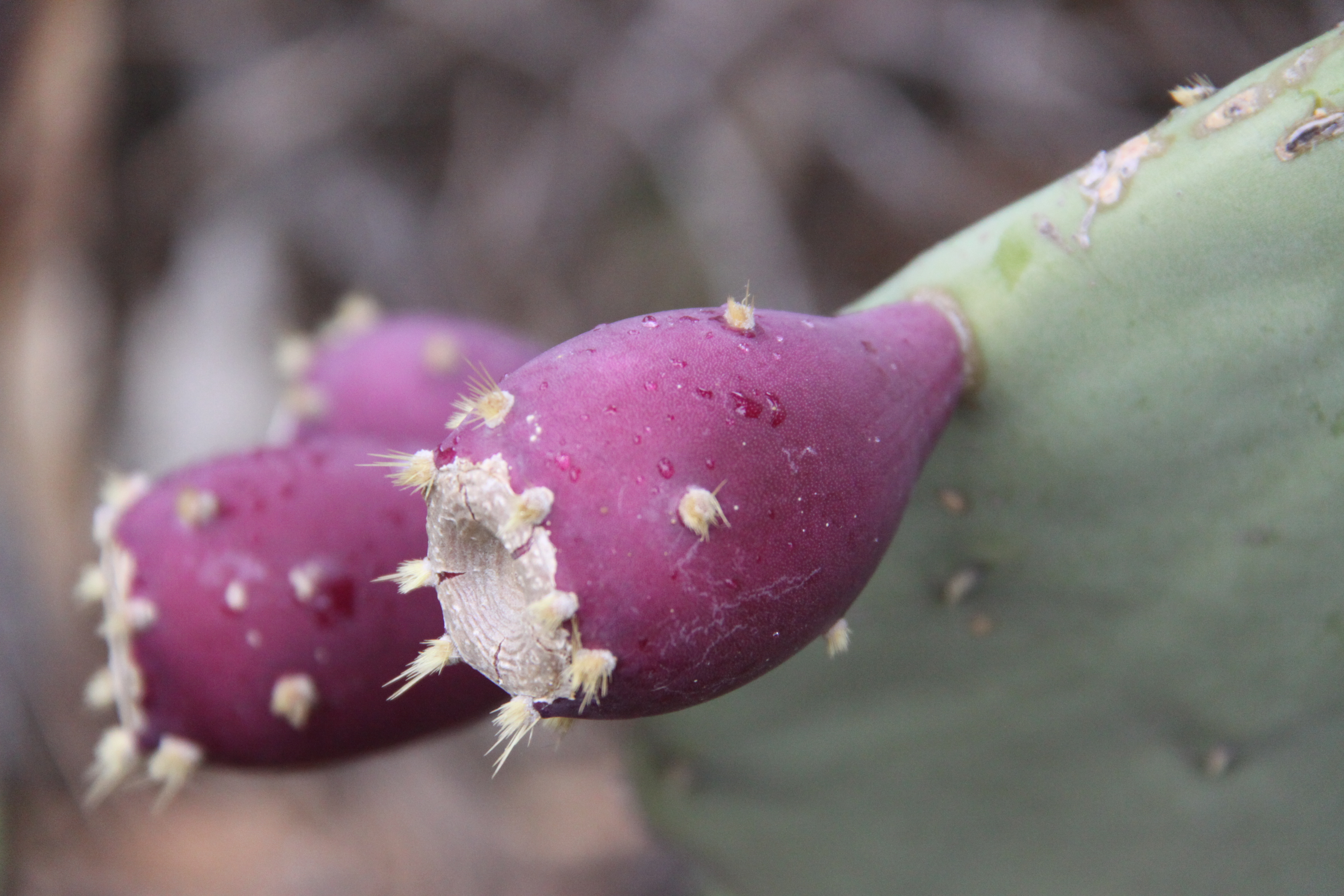 Figues de Barbarie photographiées dans le parc Pams de Collioure. Collioure, Pyrénées-Orientales, France.